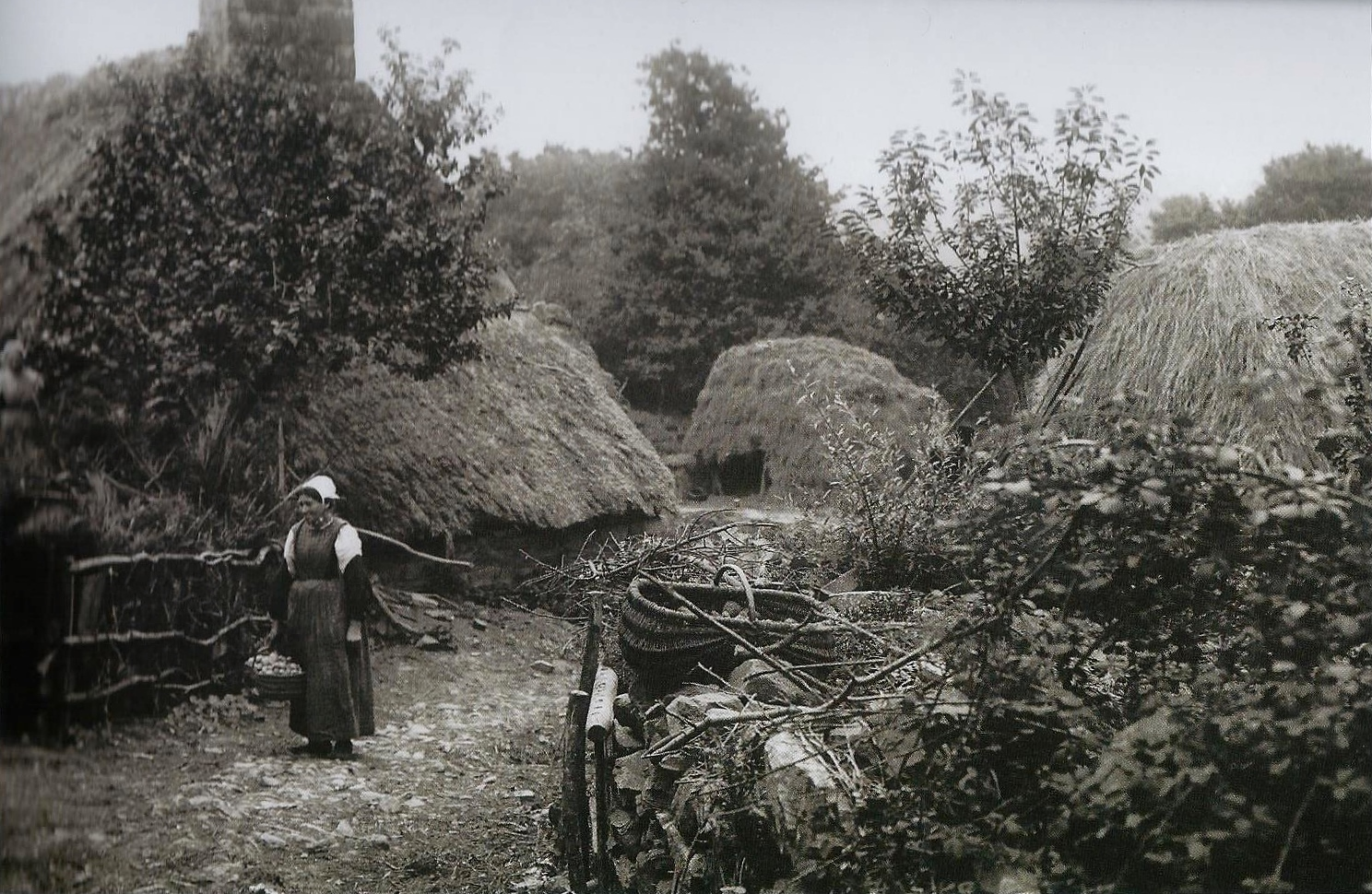 Chaumières au Pouldu (photographie de Philippe Tassier, vers 1910).